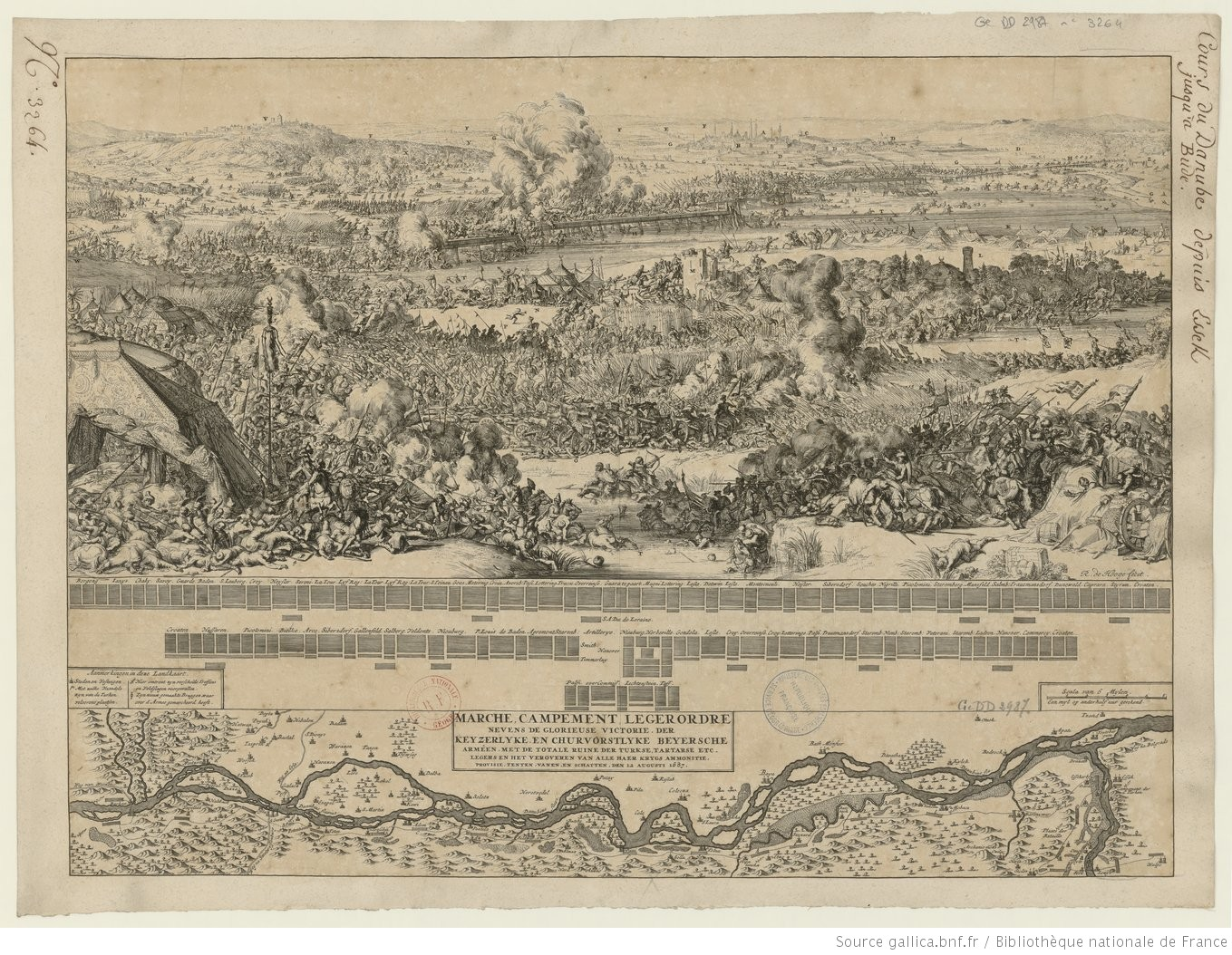 [Vue de la bataille d'Esseck] ; Marche, campement leger ordre nevens de glorieuse victorie der keyzerlyke en churvorstlyke beyersche armêen, met de totale ruine der turkse, tartarse etc. legers en het veroveren van alle haer krygs ammonitie, provisie, tenten, vanen, en schatten, den 12 augusti 1687 / R. de Hooge fecit Author : De Hooge, Romein (1645-1708). Dessinateur